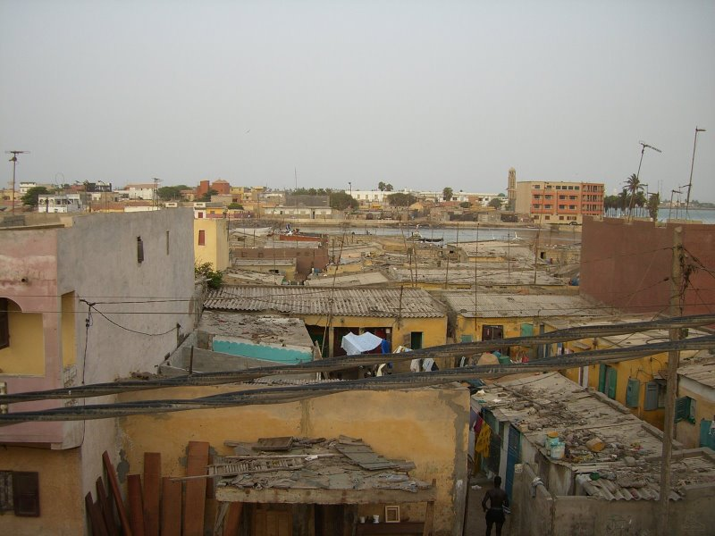 Photos du quartier de Guet Ndar a Saint-Louis du Sénégal, au loin on aperçoit le quartier Sindoné (sud) situé sur l'île de Saint-Louis.